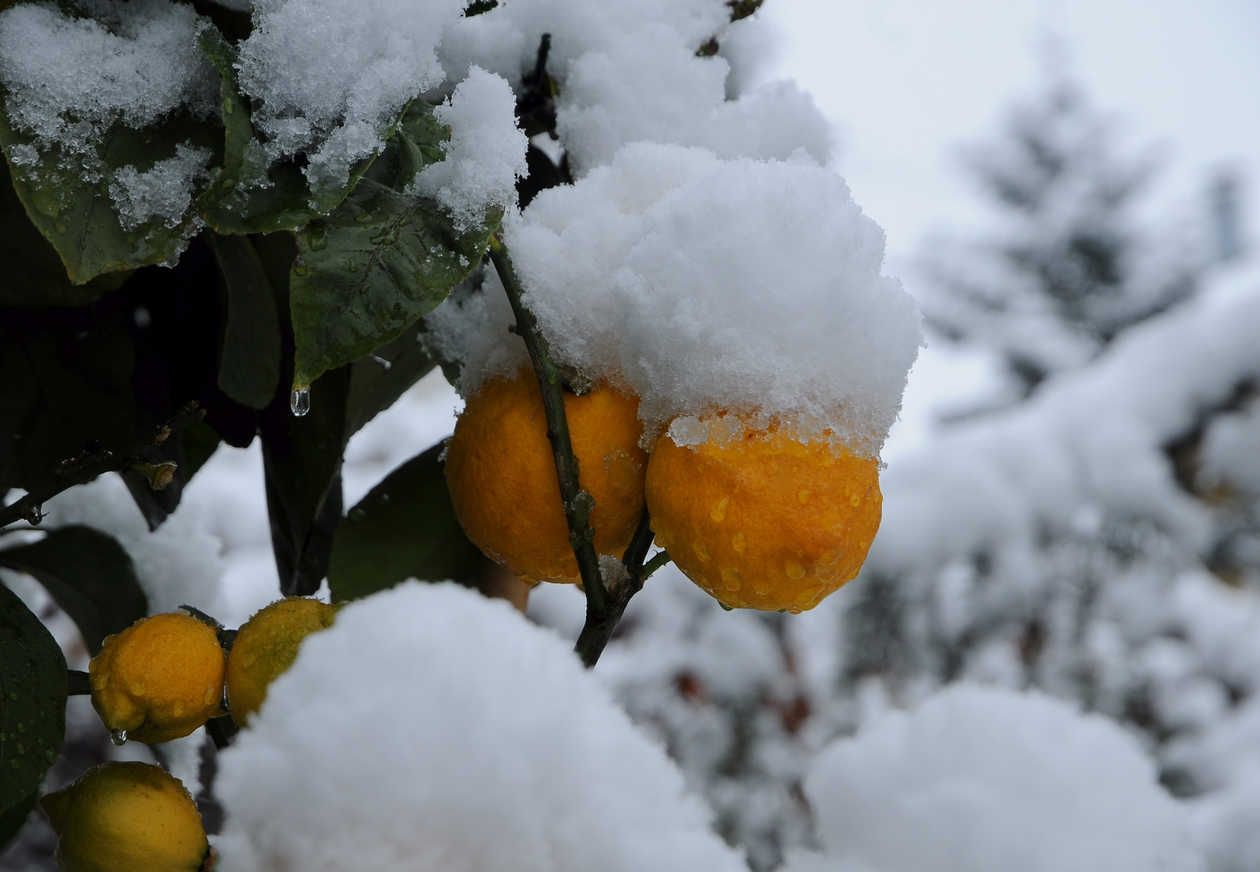 Die Orange nördlich der Mainlinie auch Apfelsine genannt, ist ein immergrüner Baum, im speziellen wird auch dessen Frucht so genannt. Die wissenschaftliche Bezeichnung ist Citrus × aurantium (Syn. Citrus aurantium L. var. sinensis L. oder Citrus sinensis (L.) Osbeck).